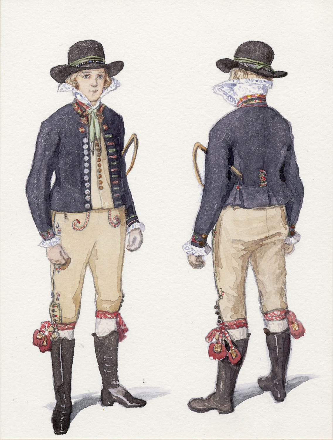 Akvarell av E. von Walterstorff föreställande ung man iklädd folkdräkt, festdräkt, från Herrestads härad i Skåne.